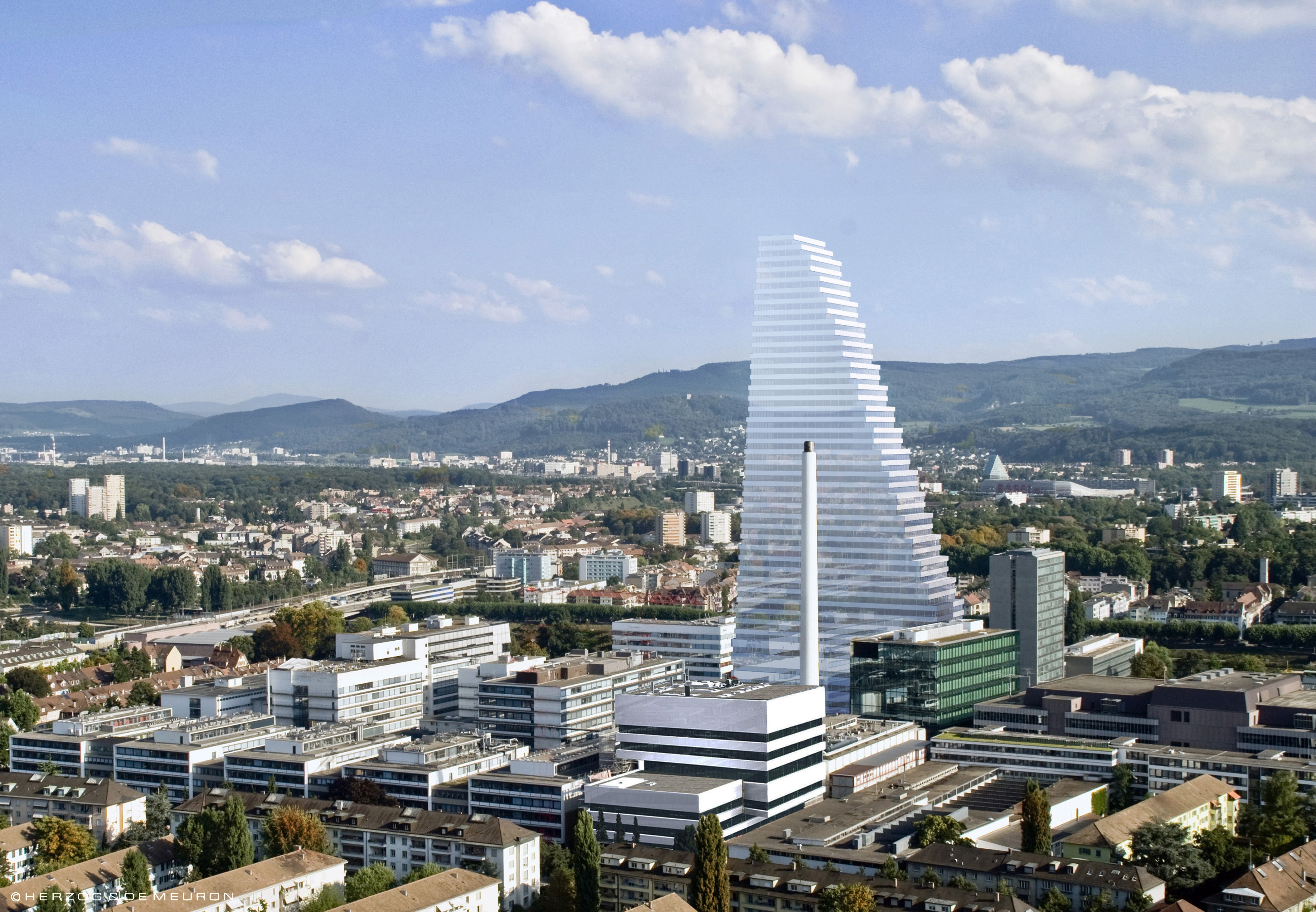 Bau 1, Hoffmann-La Roche (Bild: Herzog & de Meuron)